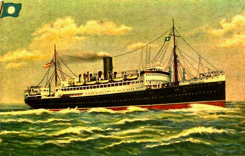 Marqués de Comillas der Compañía Transatlántica Española, Barcelona